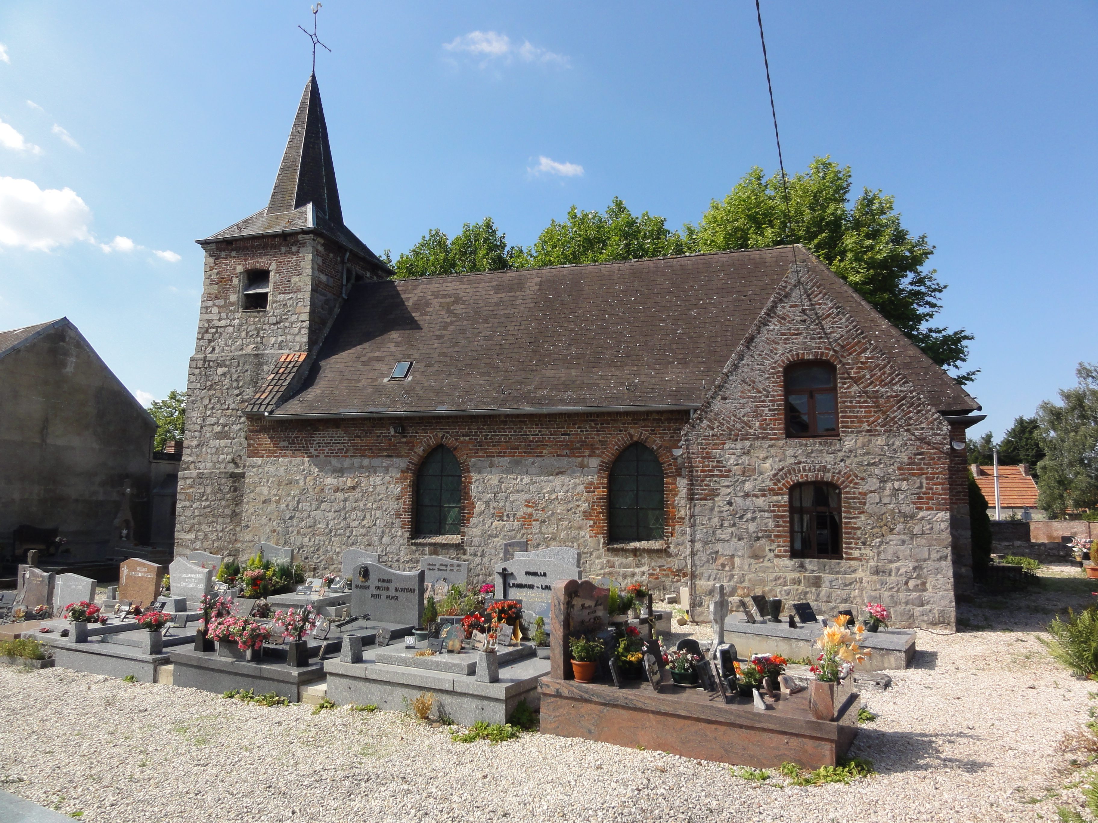 Capelle (Nord, Fr) église, vue latérale